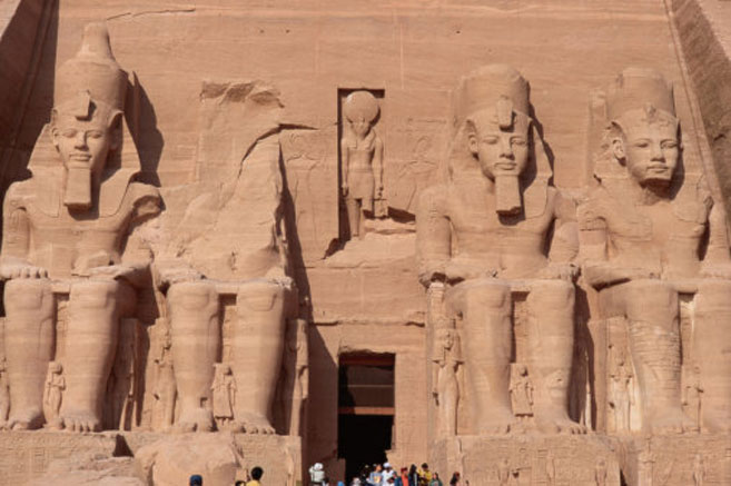 معبد ابو سمبل باسوان